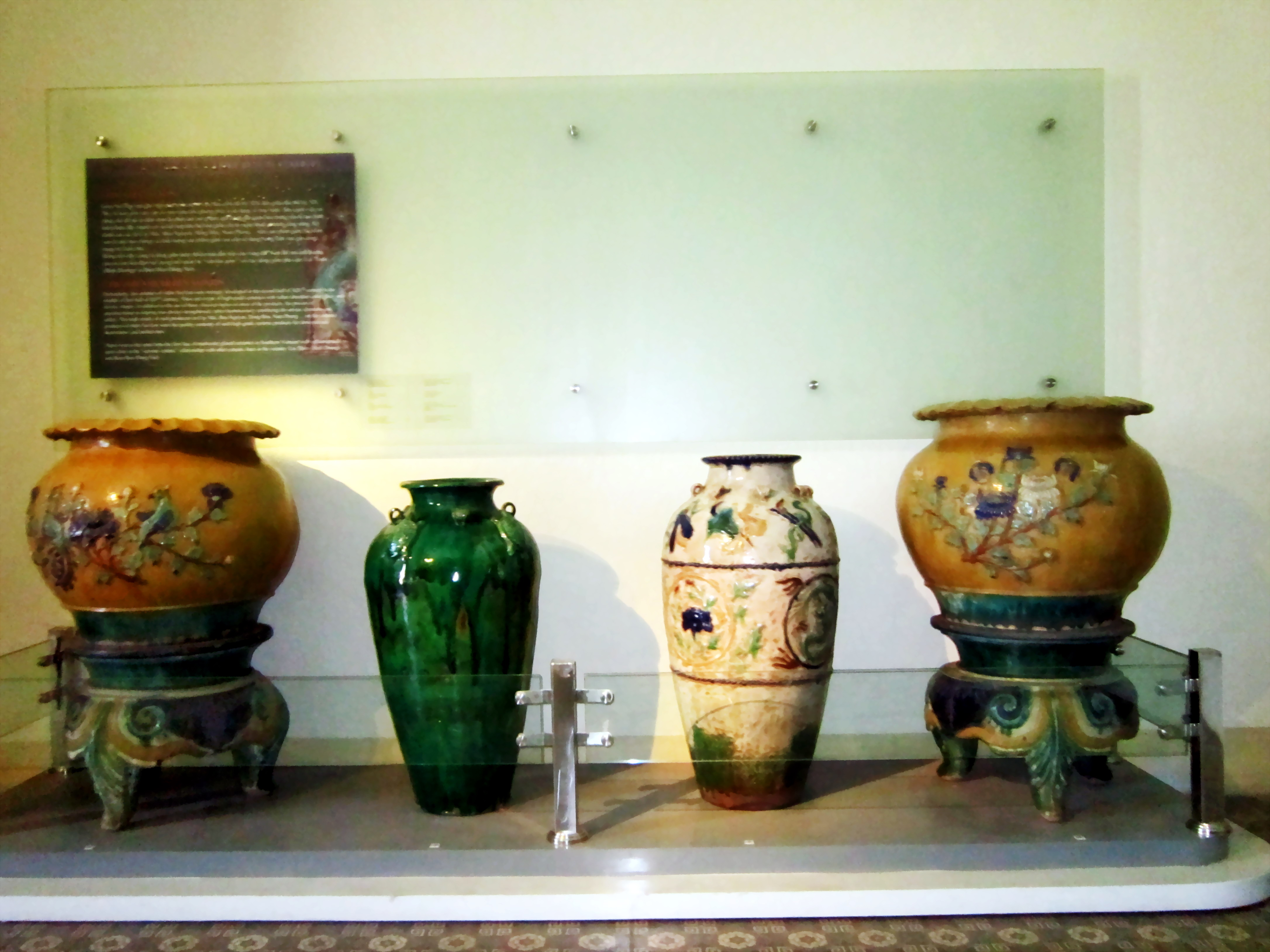 Gốm cổ ở Sài Gòn hiện đang trưng bày trong Bảo tàng Mỹ thuật Thành phố Hồ Chí Minh, Việt Nam.